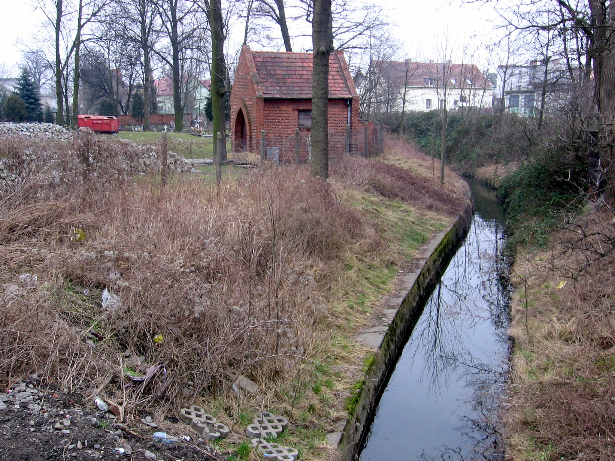 Muchobór Wielki we Wrocławiu: potok Kasina nieopodal kościoła widziany z mostku na ul. Rakietowej